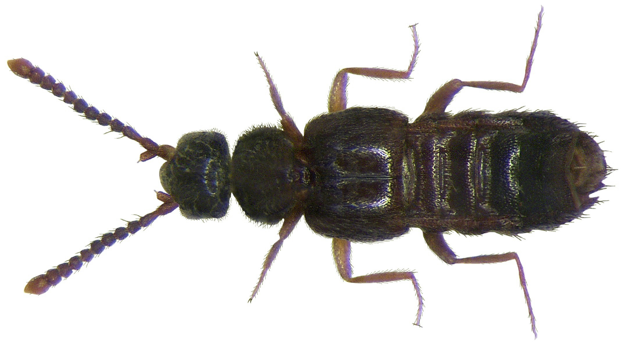 Familie: Staphylinidae Größe: 2,2 mm Fundort: Kenia, Tsavo Nationalpark, Voi Lodge leg. U.Schmidt, 1991; det. R.Pace, 2007 Foto: U.Schmidt, 2008